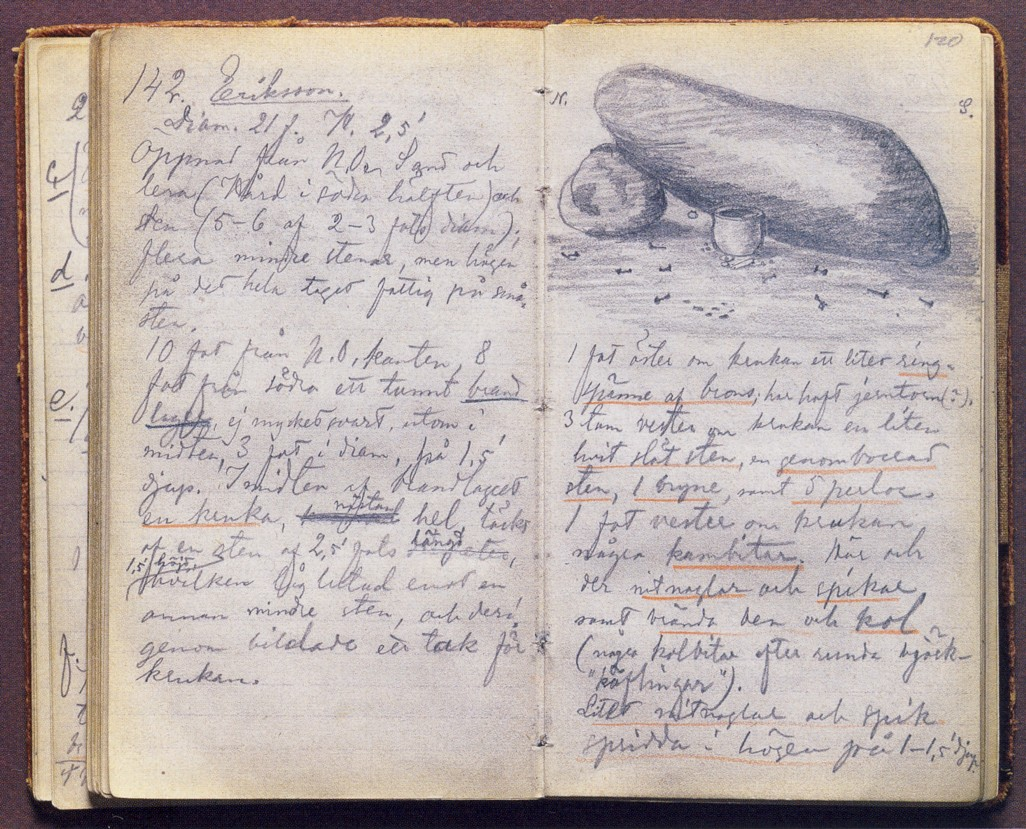 Hjalmar Stolpes Tagebuchsaufzeichnungen über die Ausgrabungen auf Birka